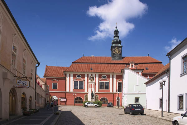 Pelhřimov, zámek pánů z Říčan, sídlo pelhřimovské expozice Muzea Vysočiny, pohled od Masarykova náměstí.